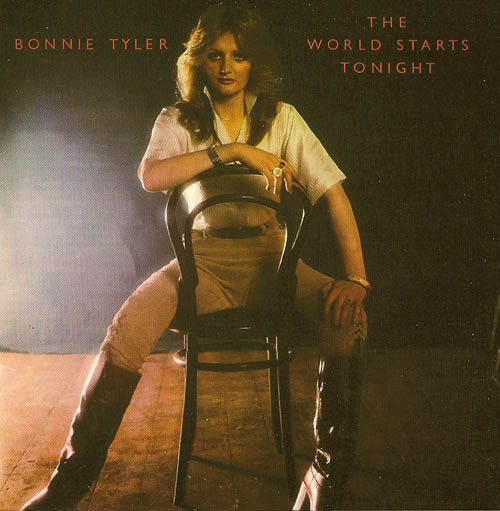 Bonnie Tyler - The World Starts Tonight című lemezének borítója (2009)